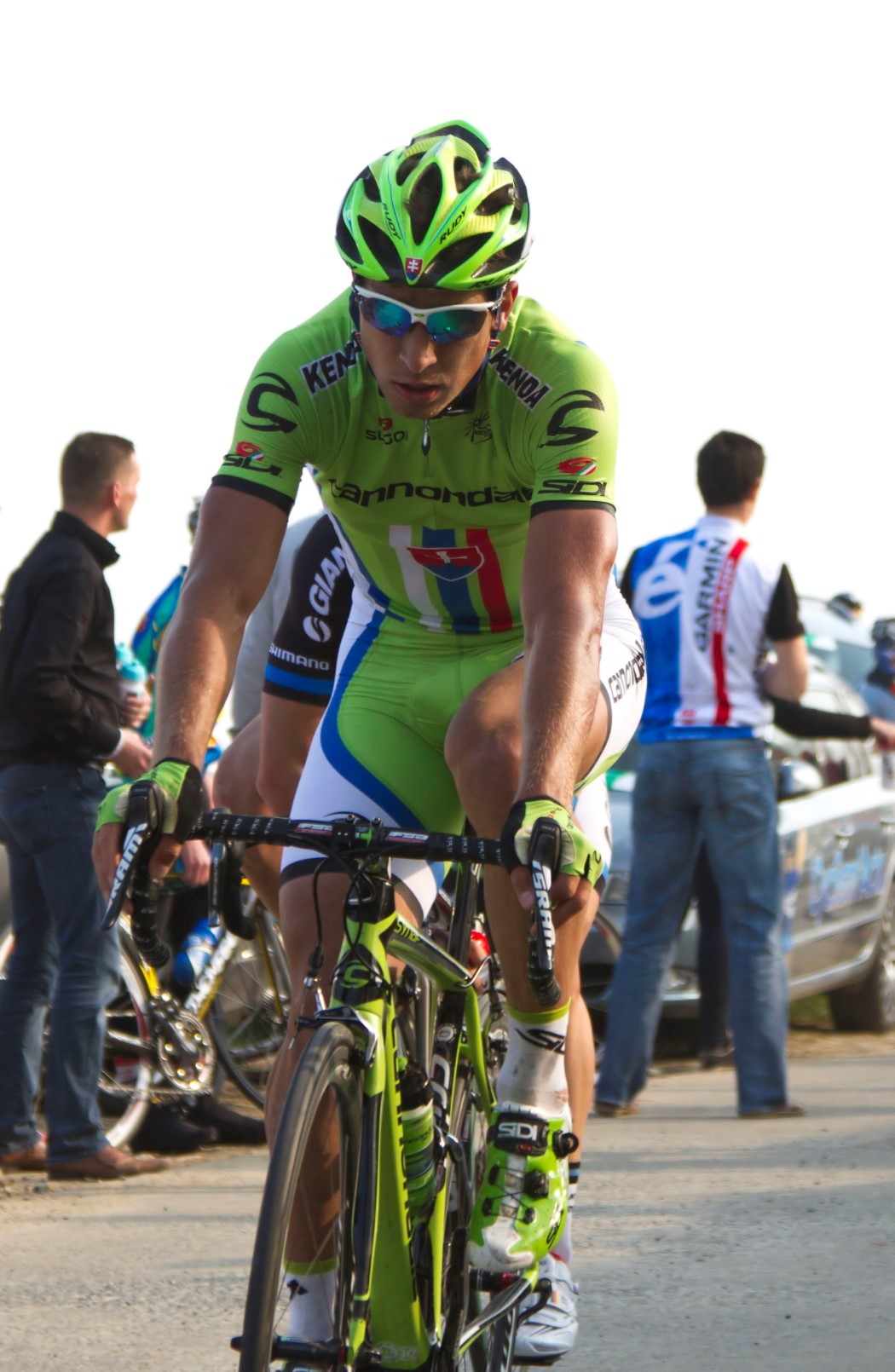 084 sagan